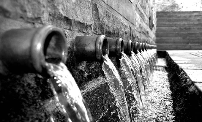 20-Röhrenbrunnen Altleiningen